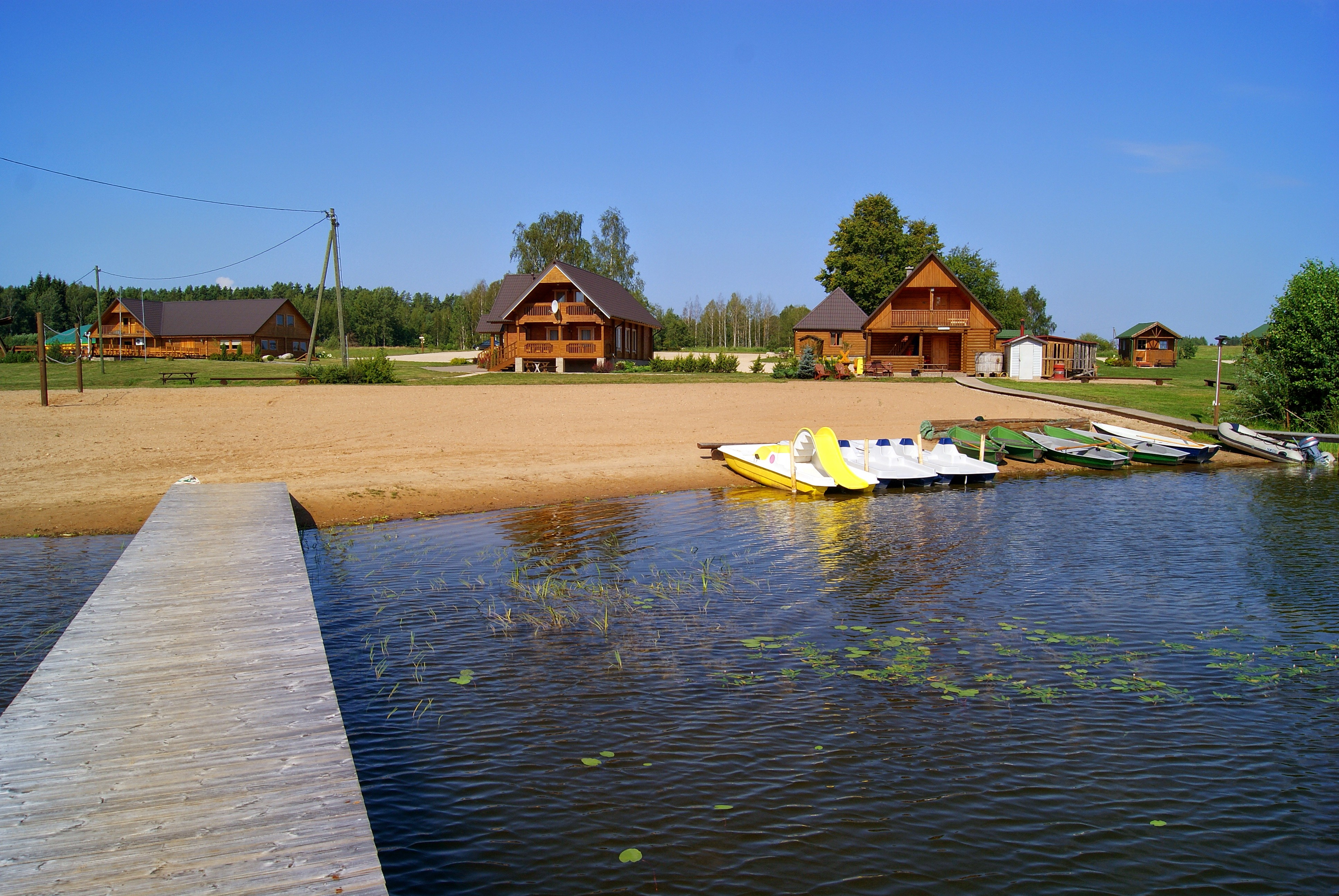 Kempings "Saliņas" pie Sviļu ezera